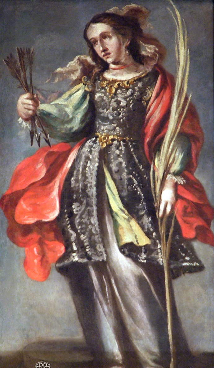 La obra representa a Santa Victoria, que murió junto con San Acisclo por profesar el cristianismo.